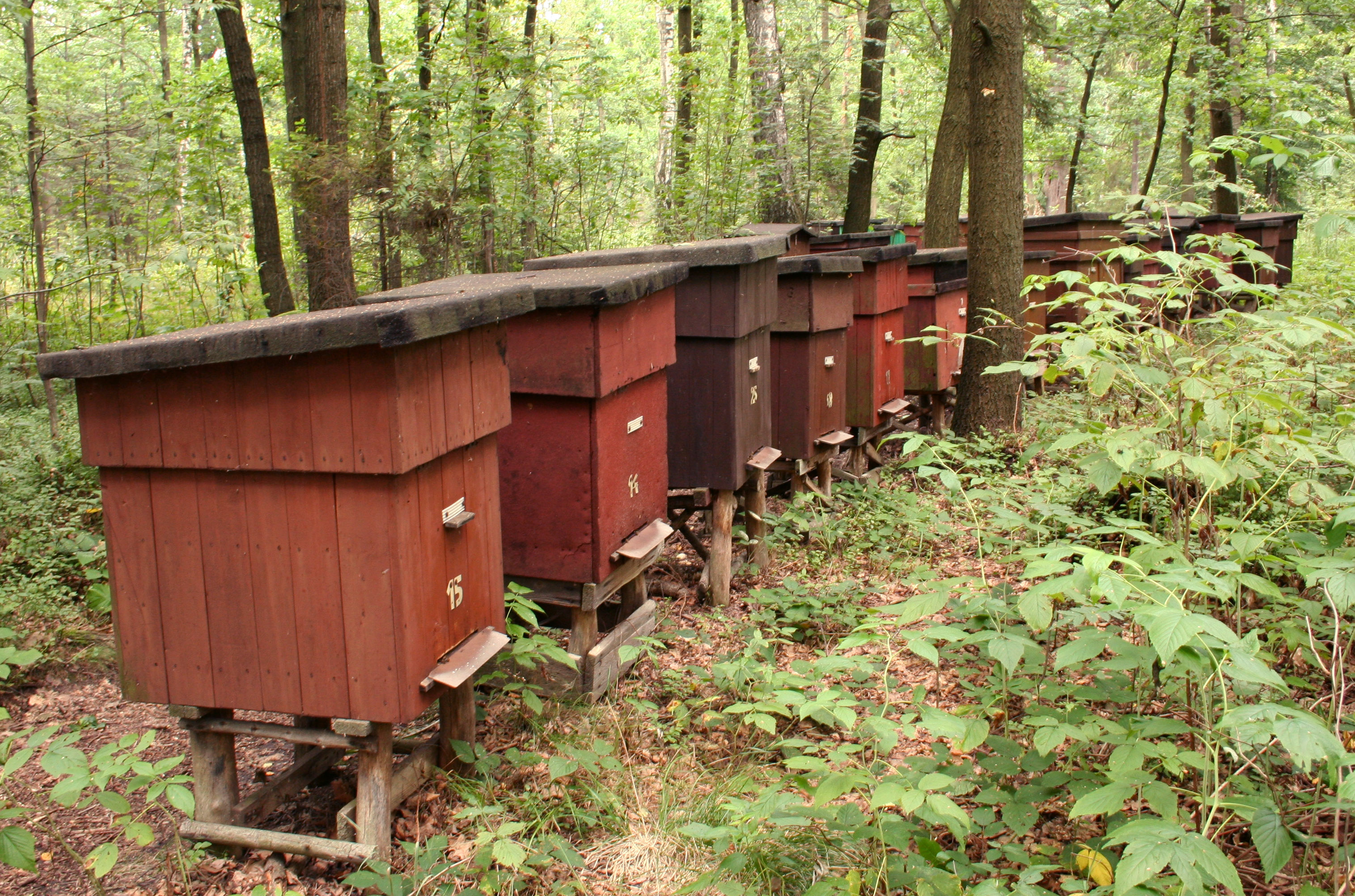 Pasieka w Lipowcu, Nadleśnictwo Koszęcin